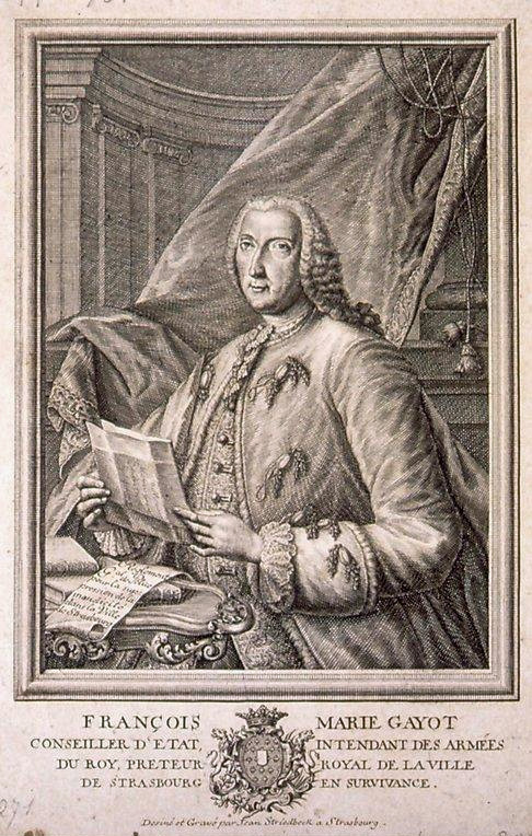 François Marie Gayot, conseiller d'état intendant des armées du Roy, prêteur royal de la ville de Strasbourg en survivance. 1750. Bibliothèque nationale et universitaire de Strasbourg